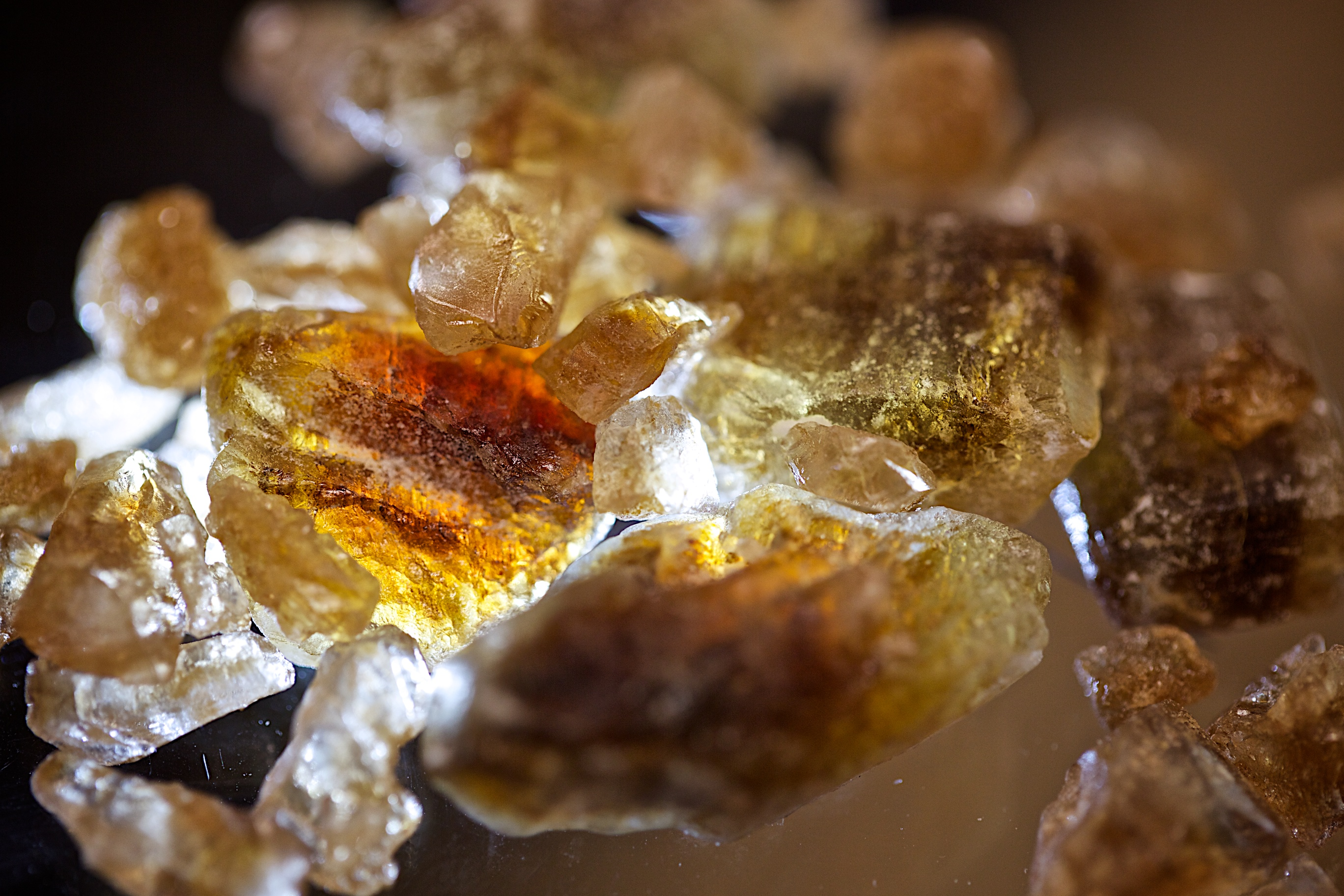 Belgian Candi Sugar